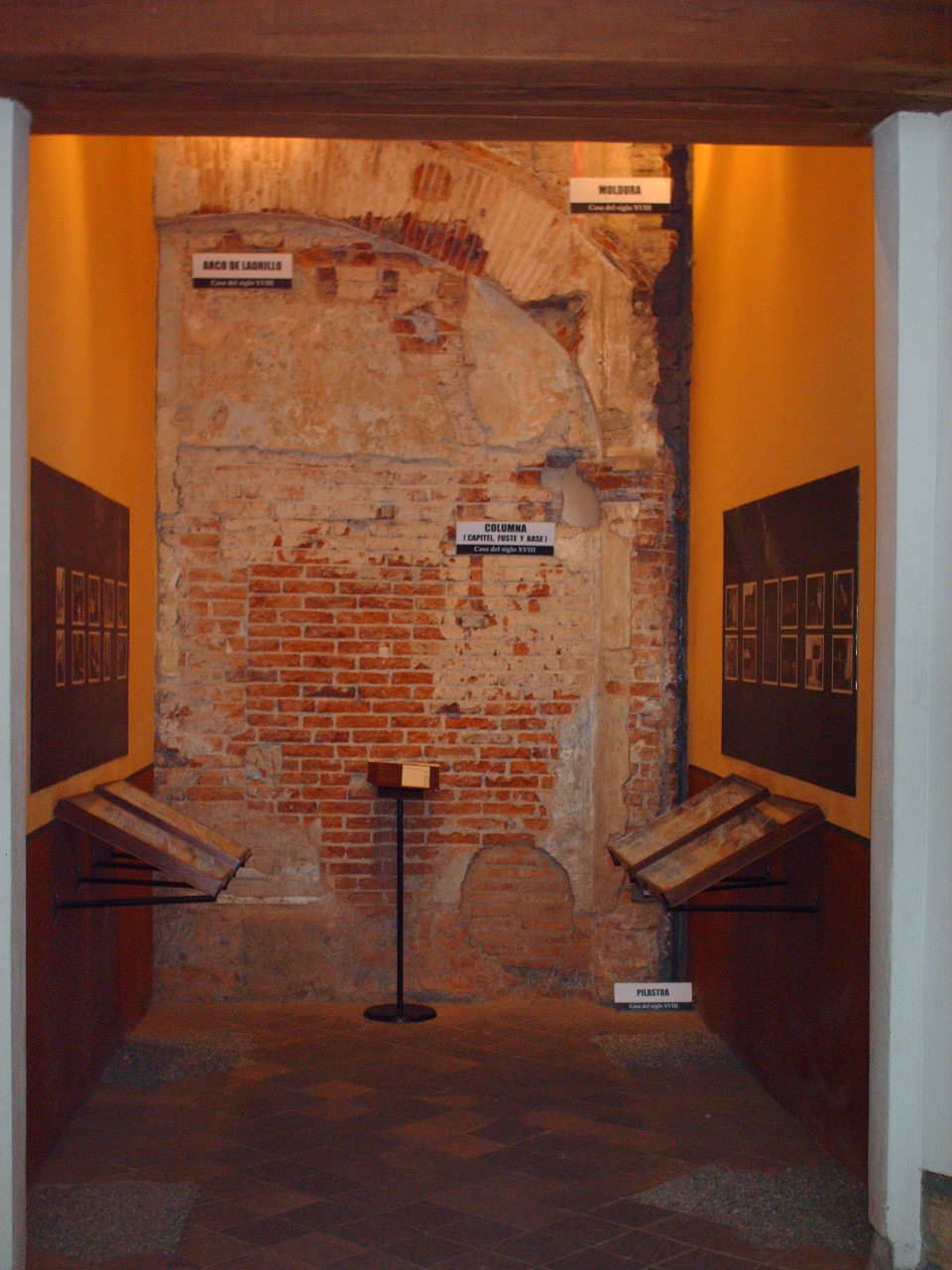 Casa histórica del centro de la ciudad de Caracas.